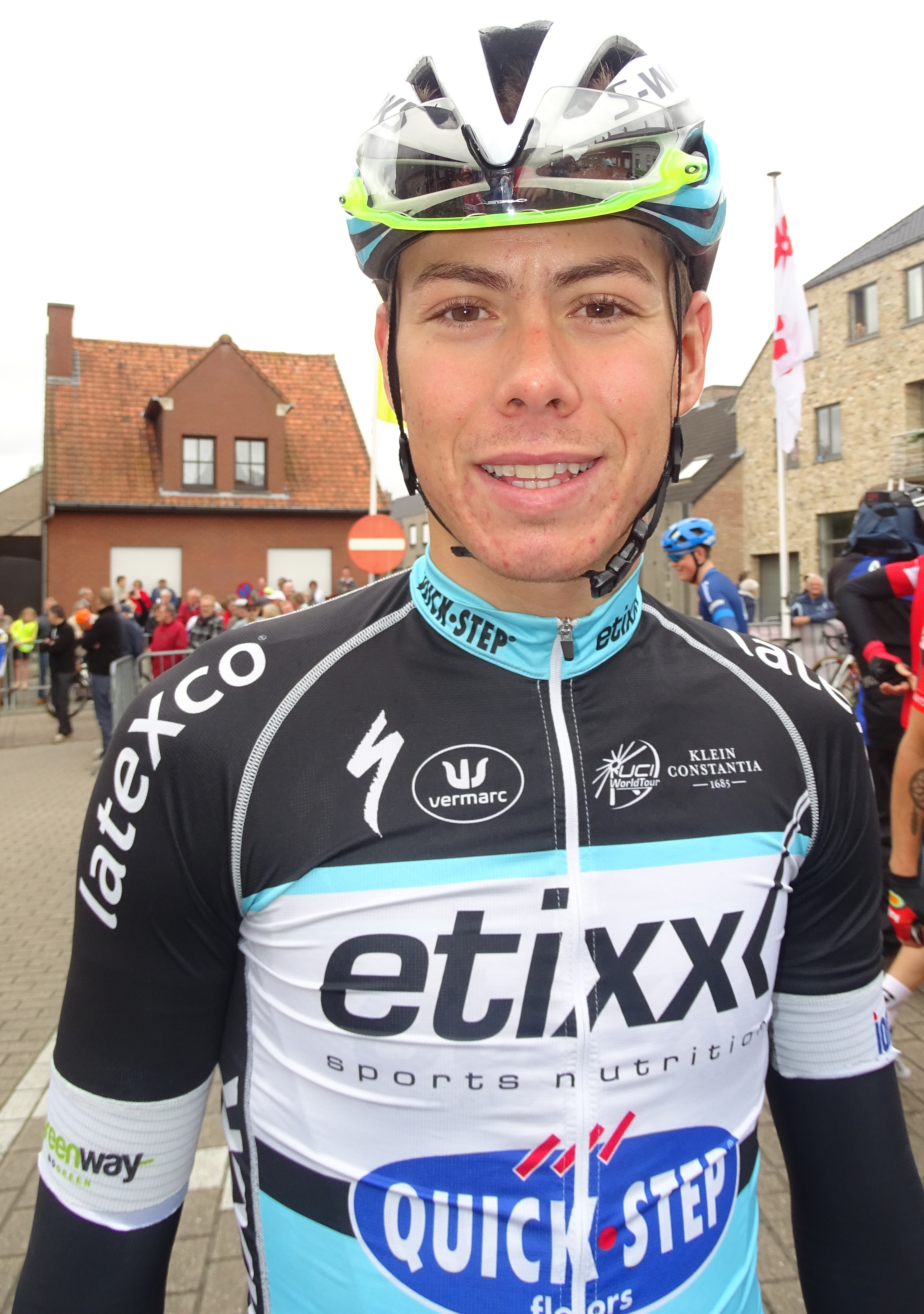 Reportage réalisé le vendredi 18 septembre à l'occasion de l'arrivée du Championnat des Flandres 2015 à Koolskamp (Ardooie), Belgique.